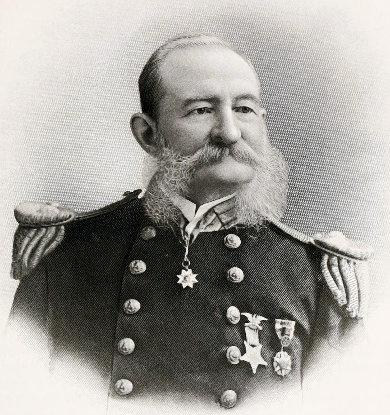 Zera Luther Tanner